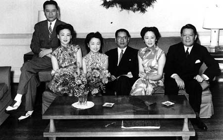 1942年﹐宋氏兄弟及其夫人在美國華盛頓共度聖誕節時留影。左起﹕宋子安與夫人吳其英﹑宋子良夫人席曼英﹑宋子文與夫人張樂怡﹑宋子良。